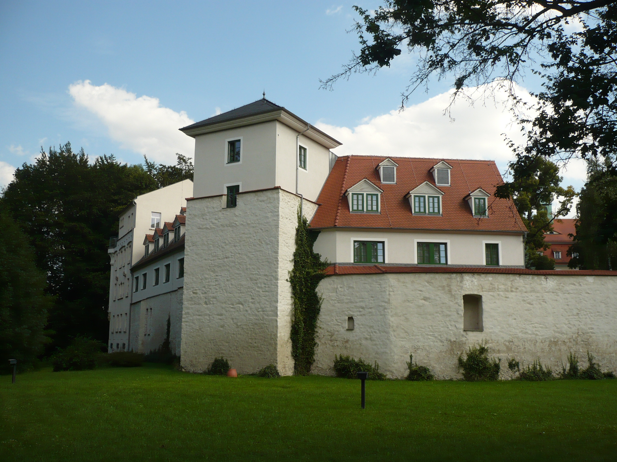 Mury i wieża Zamku Schweinsburg w Neukirchen Pleiße